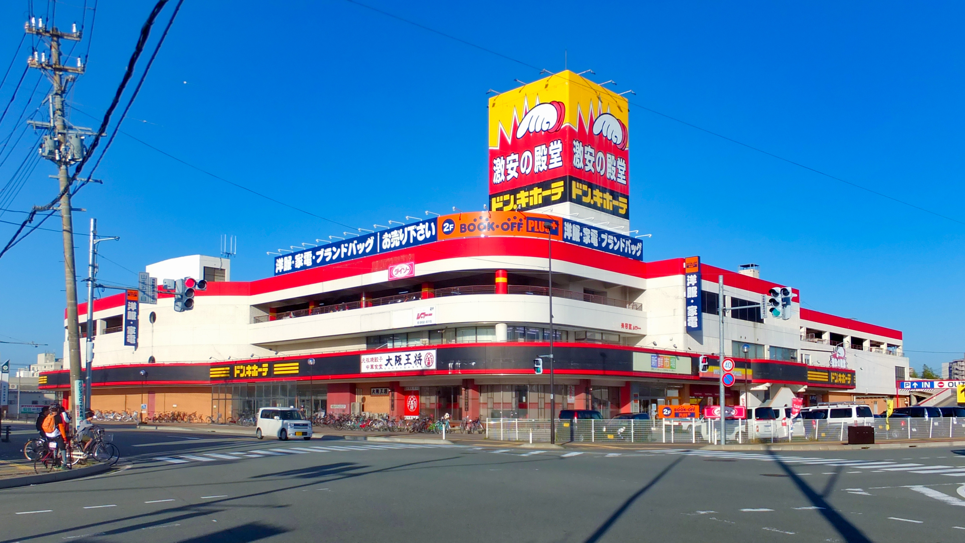 ドン．キホーテ秋田店（秋田市旭北錦町、中交ホリディスクエア内）。秋田中央交通長崎屋バスターミナルも同居する。